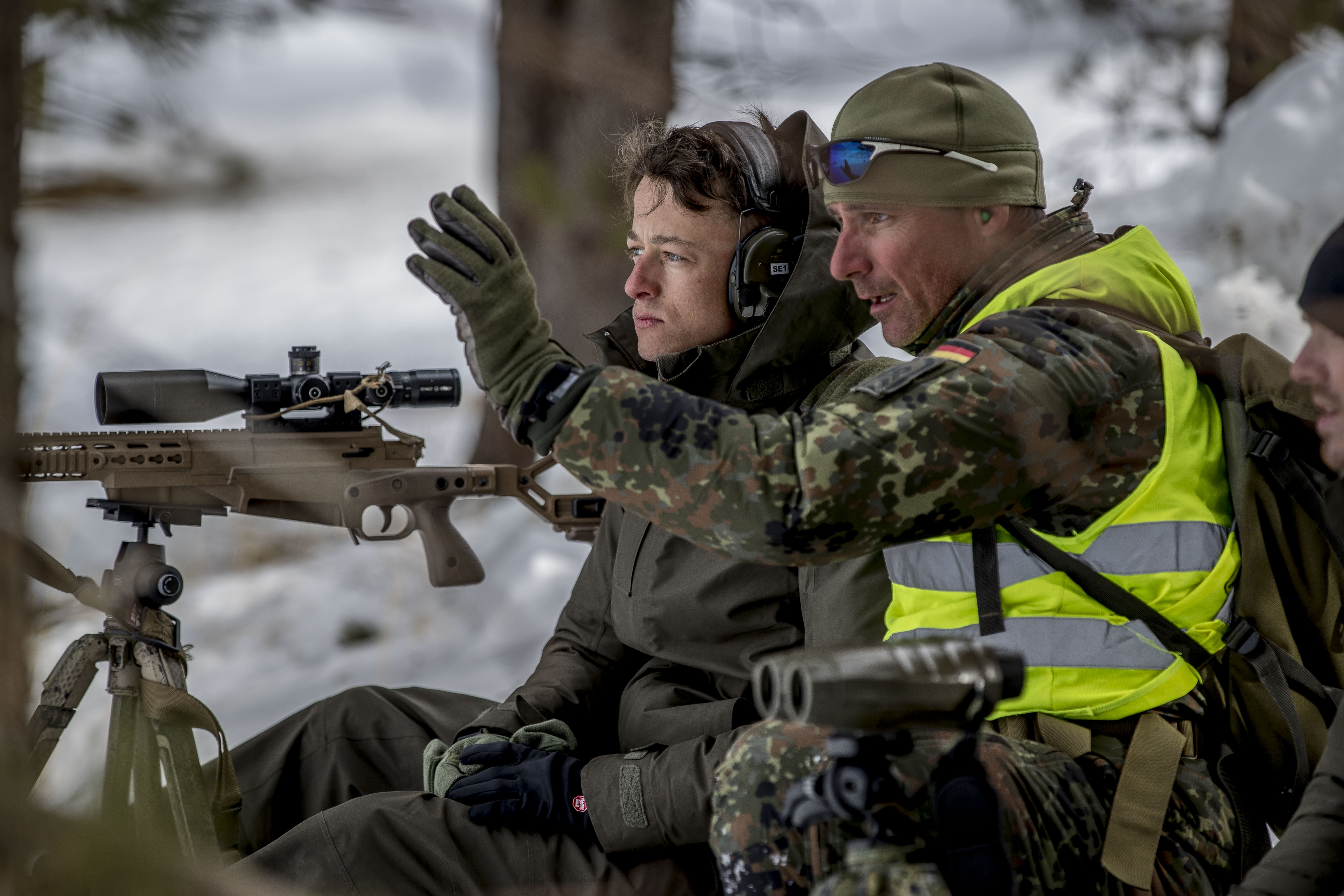 Judenburg, Oostenrijk 20 Februari 2019 High Angle shoot training Scherpschutter oefenen in berg gebied